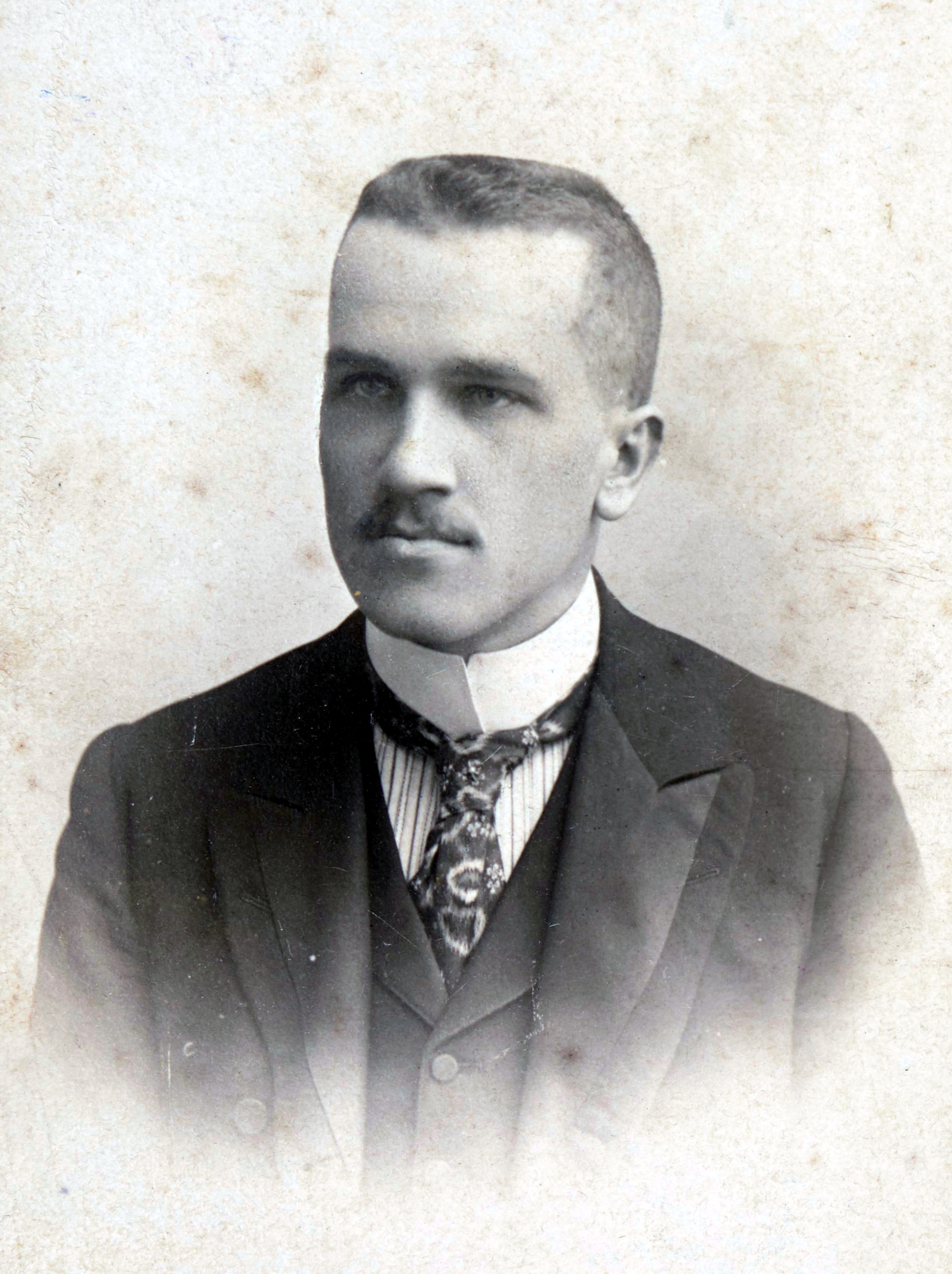 Ludwik Janowski